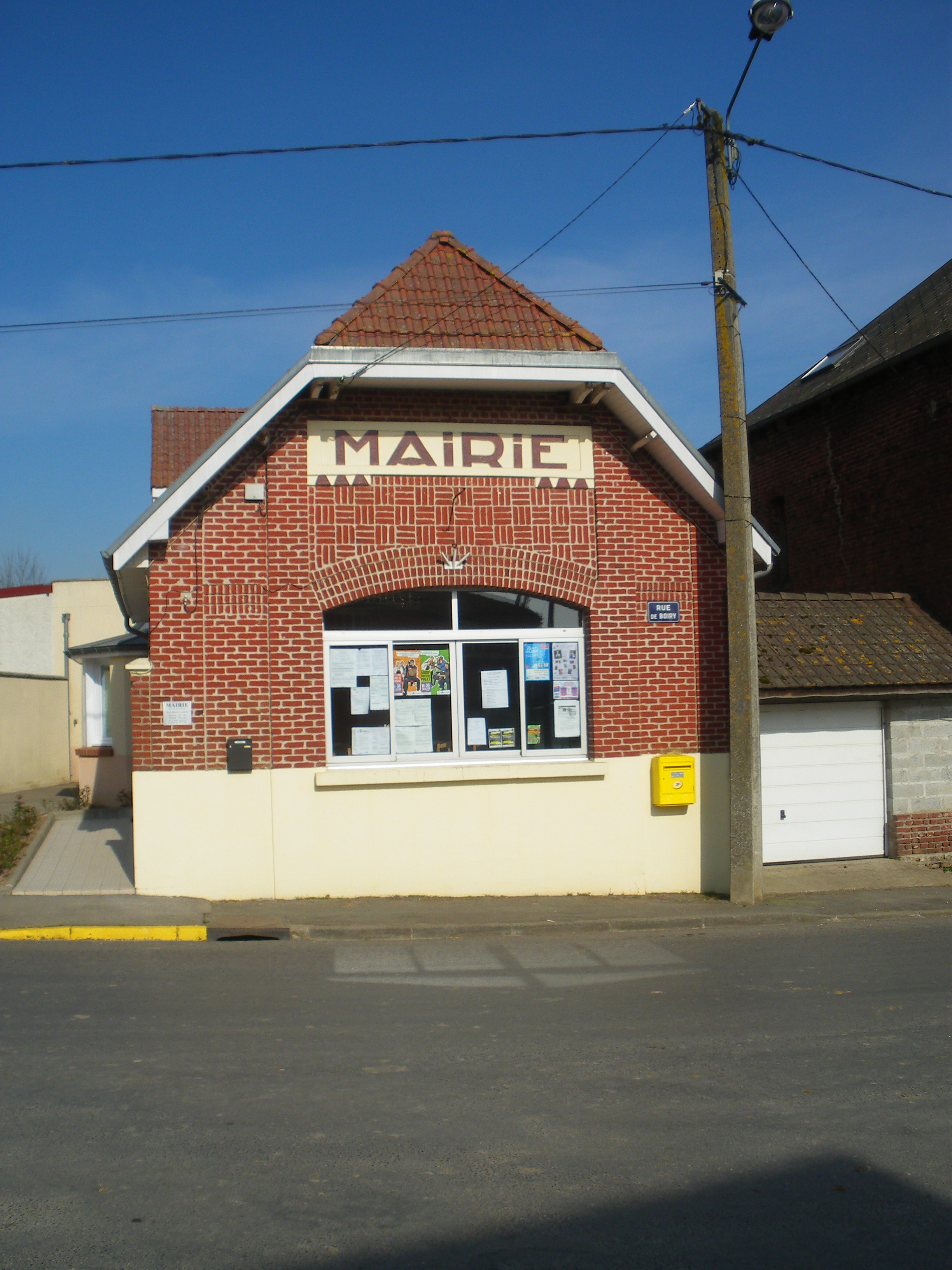 Vue de la mairie de Douchy-lès-Ayette.